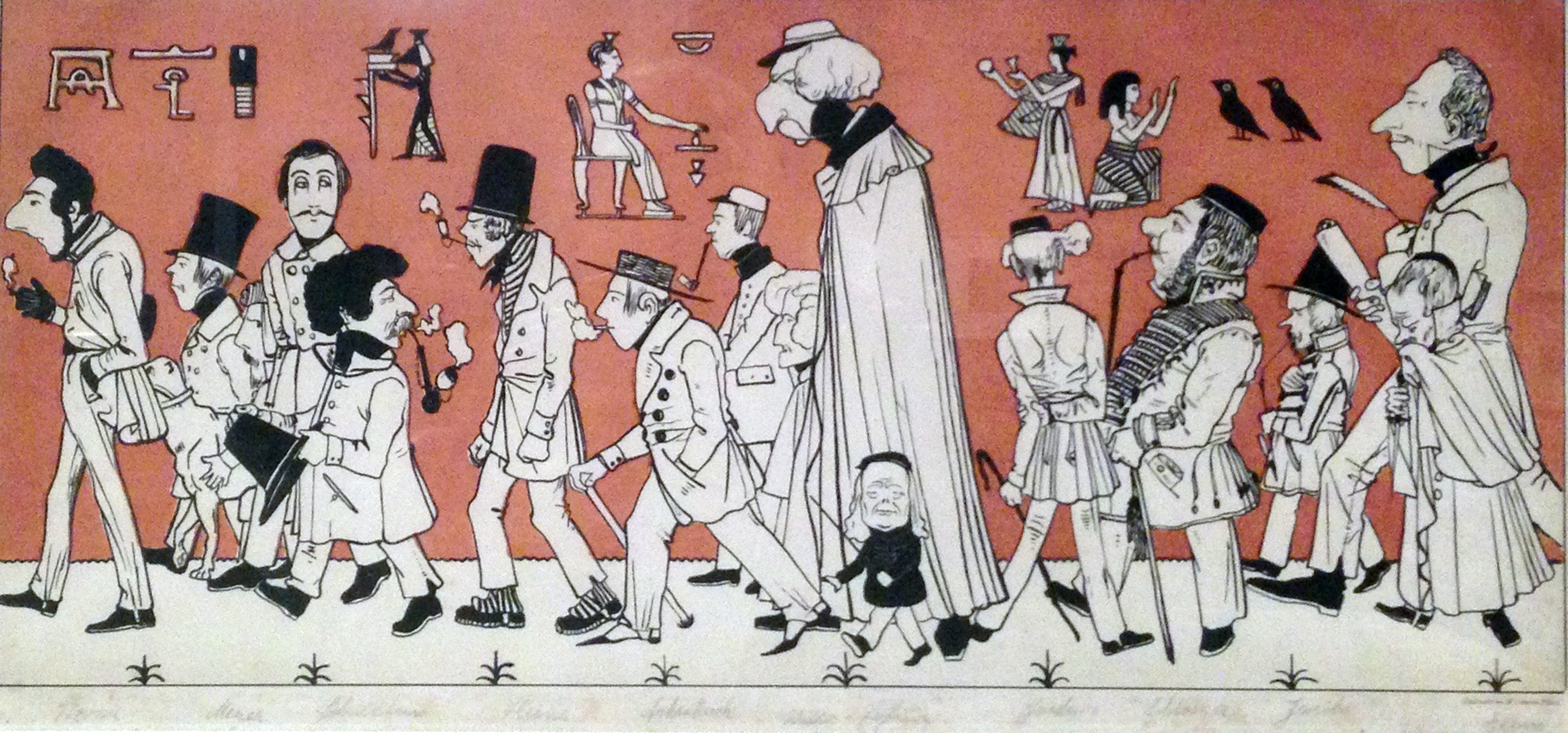 Der "Zug der Düsseldorfer Künstler" von 1837 treibt die malende Zunft auf die Spitze. Bizarre Gestalten ziehen vor rötlichem Grund wie in einer altägyptischen Malerei vorüber. Dazwischen schweben frei erfundene Symbole, die an die Zeit der Pharaonen erinnern. Abgebildet u.a. Johann Georg Meyer, Wilhelm Joseph Heine, Achenbach (er selbst oder sein Bruder Oswald), Rudolf Jordan (nur Rückseite), Johann Wilhelm Schirmer